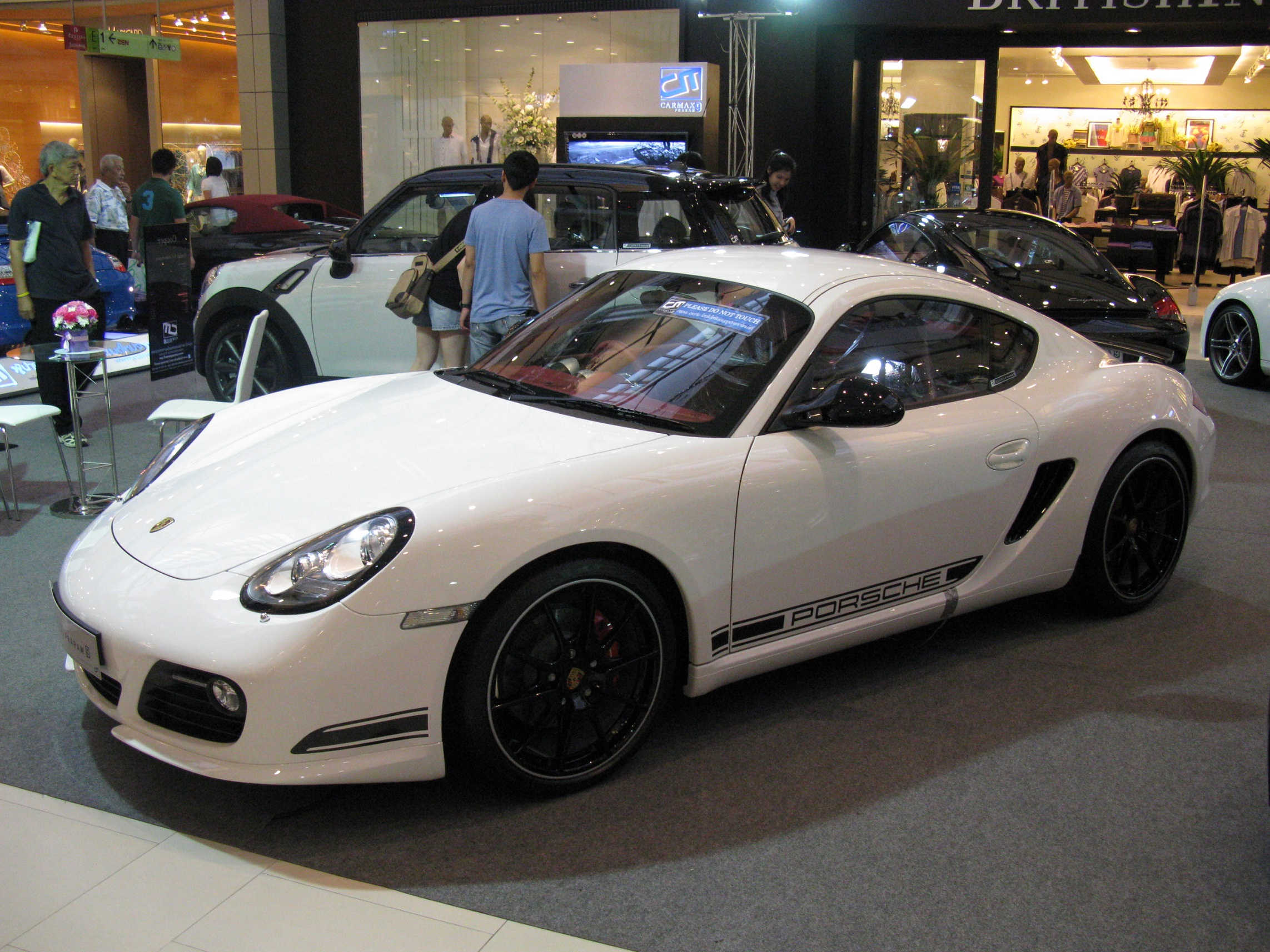 Central World, Bangkok